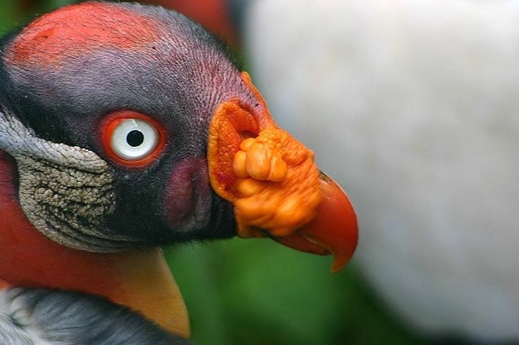 Königsgeier (Sarcoramphus papa)